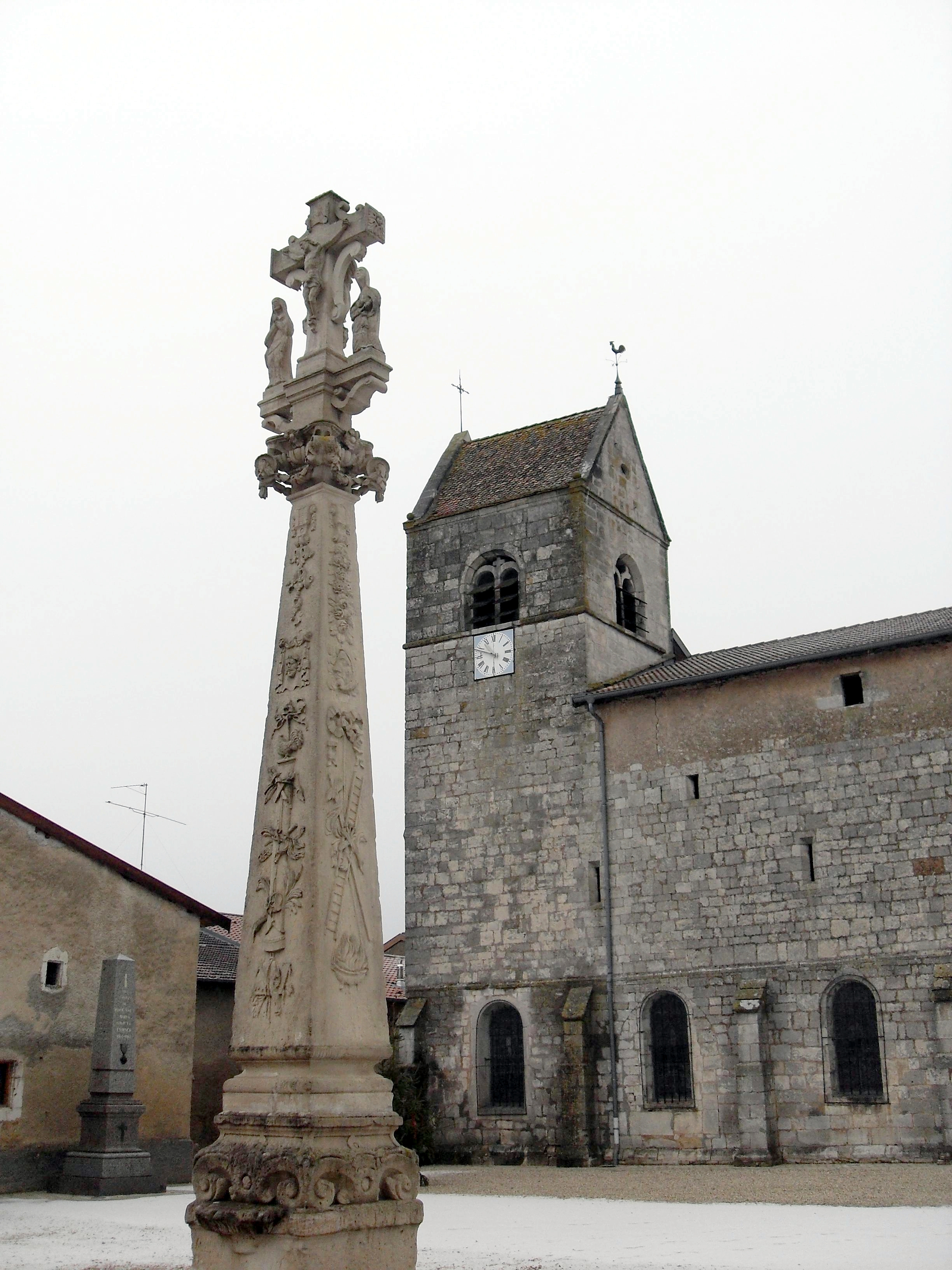 Troussey Meuse (55) - Place de l'église un jour de neige Le calvaire, qui était endommagé, a été entièrement restauré (vers la fin du 20ème ou le début du 21ème siècle)